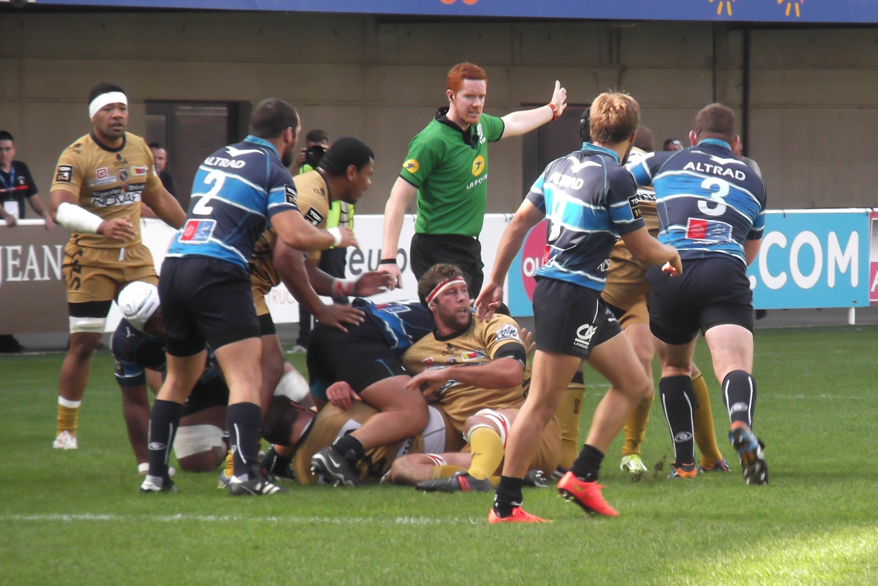 MHR-Oyonnax (25-9), 11 octobre 2014, 9e journée du Top 14.